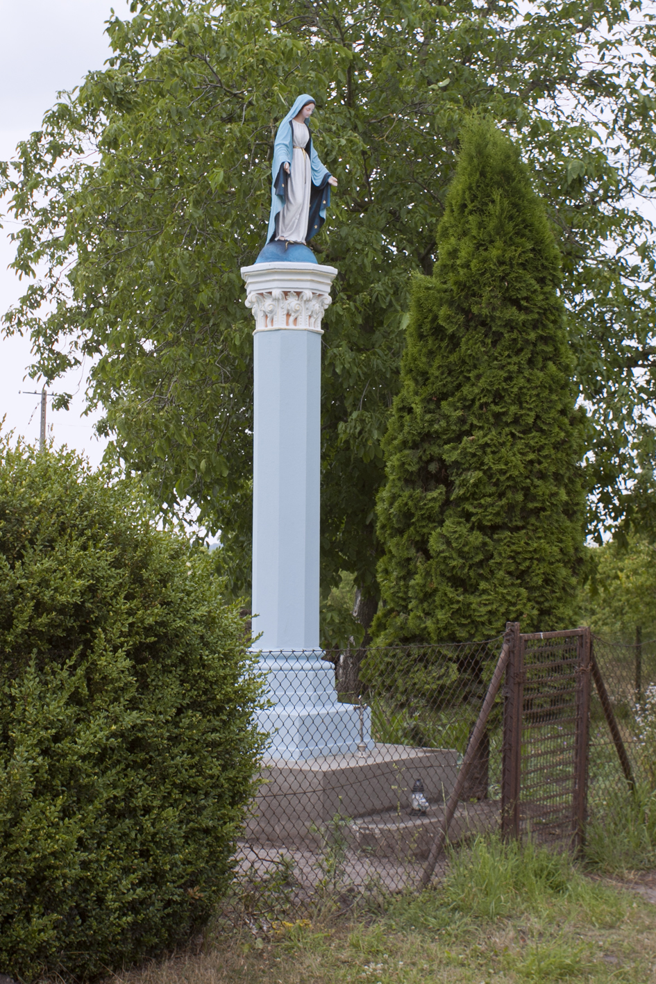 Figura Najświętszej Maryi Panny Niepokalanie Poczętej z lat. 20. XX wieku, Wróble